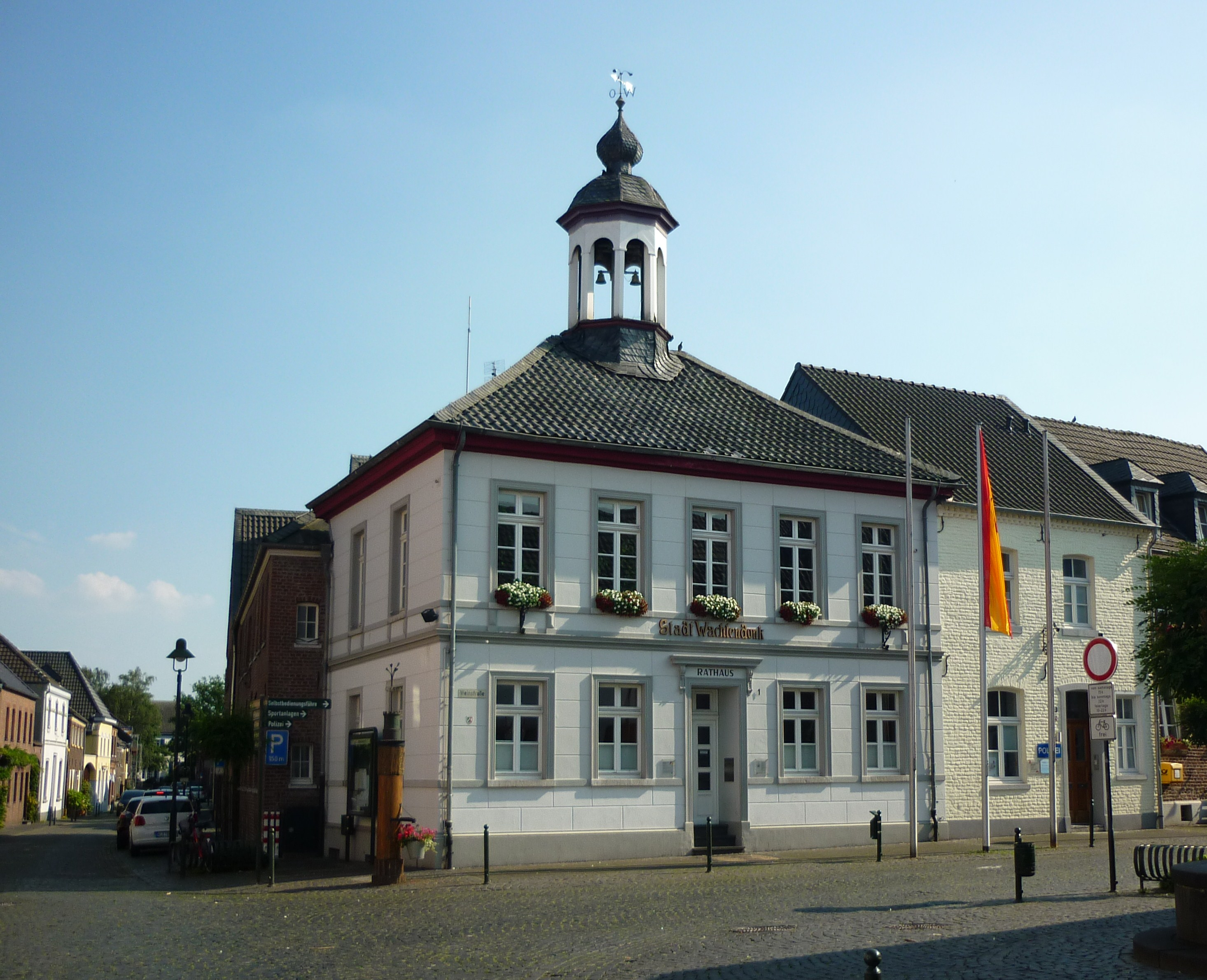 Wachtendonk, Rathaus, Weinstraße 1 This image shows a heritage building in Germany, located in the North Rhine-Westphalian city Wachtendonk (no. 2).